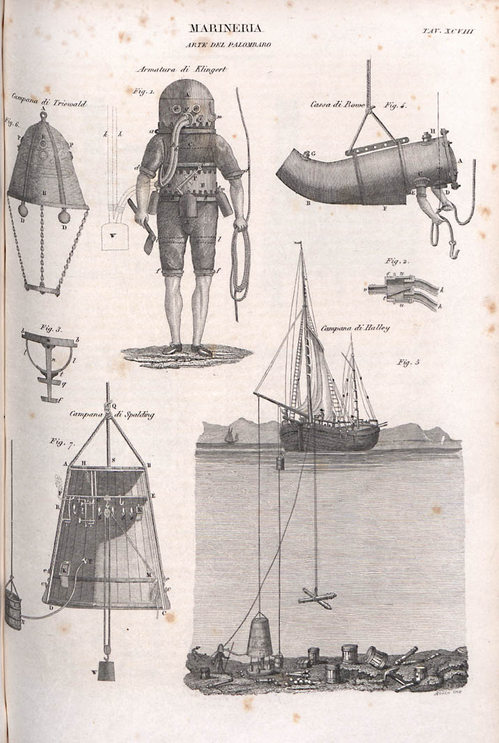 Palombaro tratto da Nuova enciclopedia popolare. 13